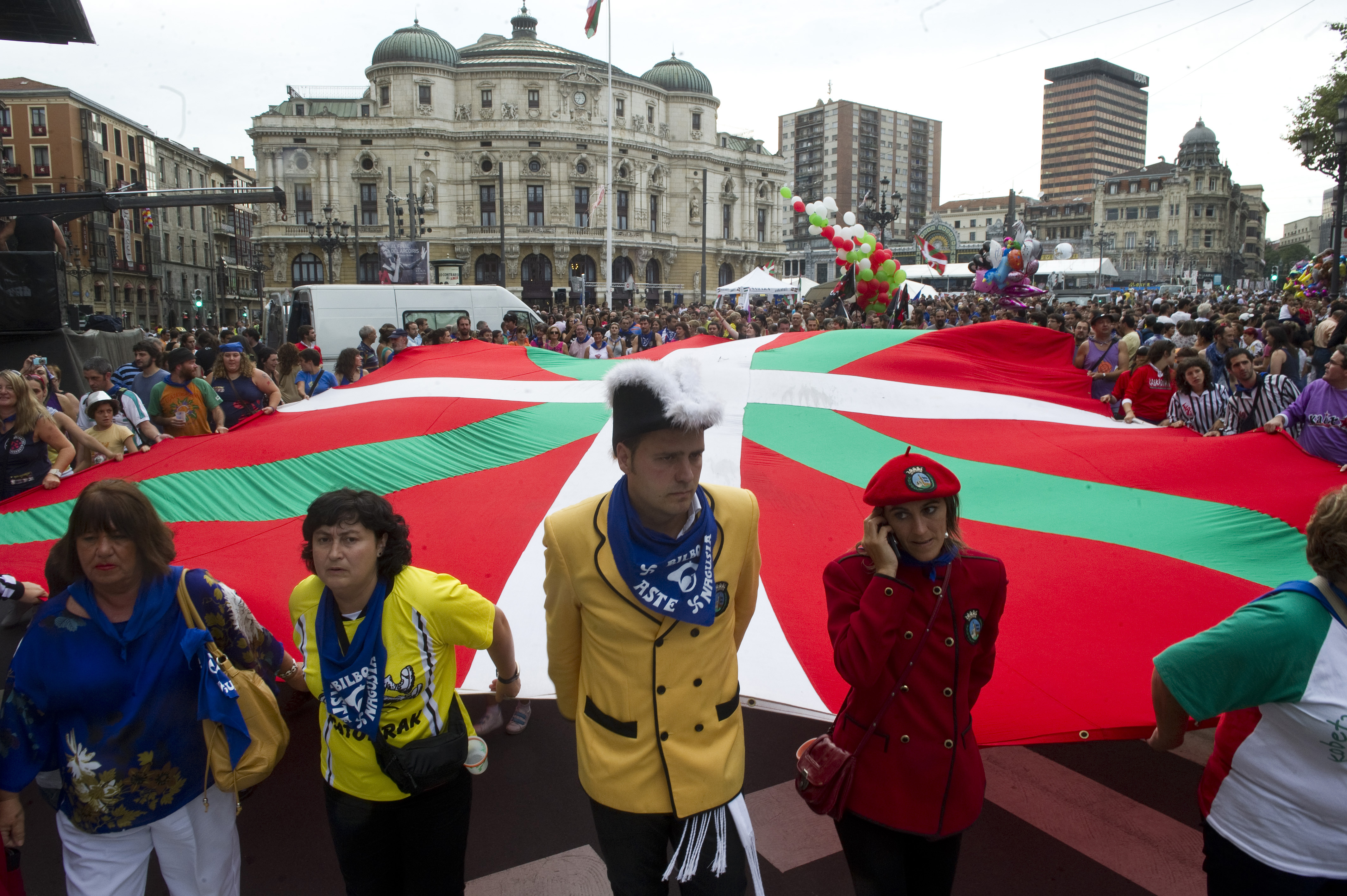 Aste Nagusia 2011. Homenaje a la Ikurriña.